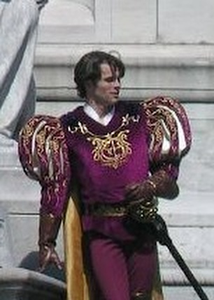 James Marsden on the set of "Enchanted" le jeune James Marsden, actuellement à l'affiche dans X-Men et pour l'occasion habillé en prince "Disney".